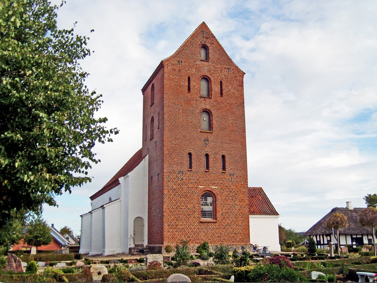 fra nordvest